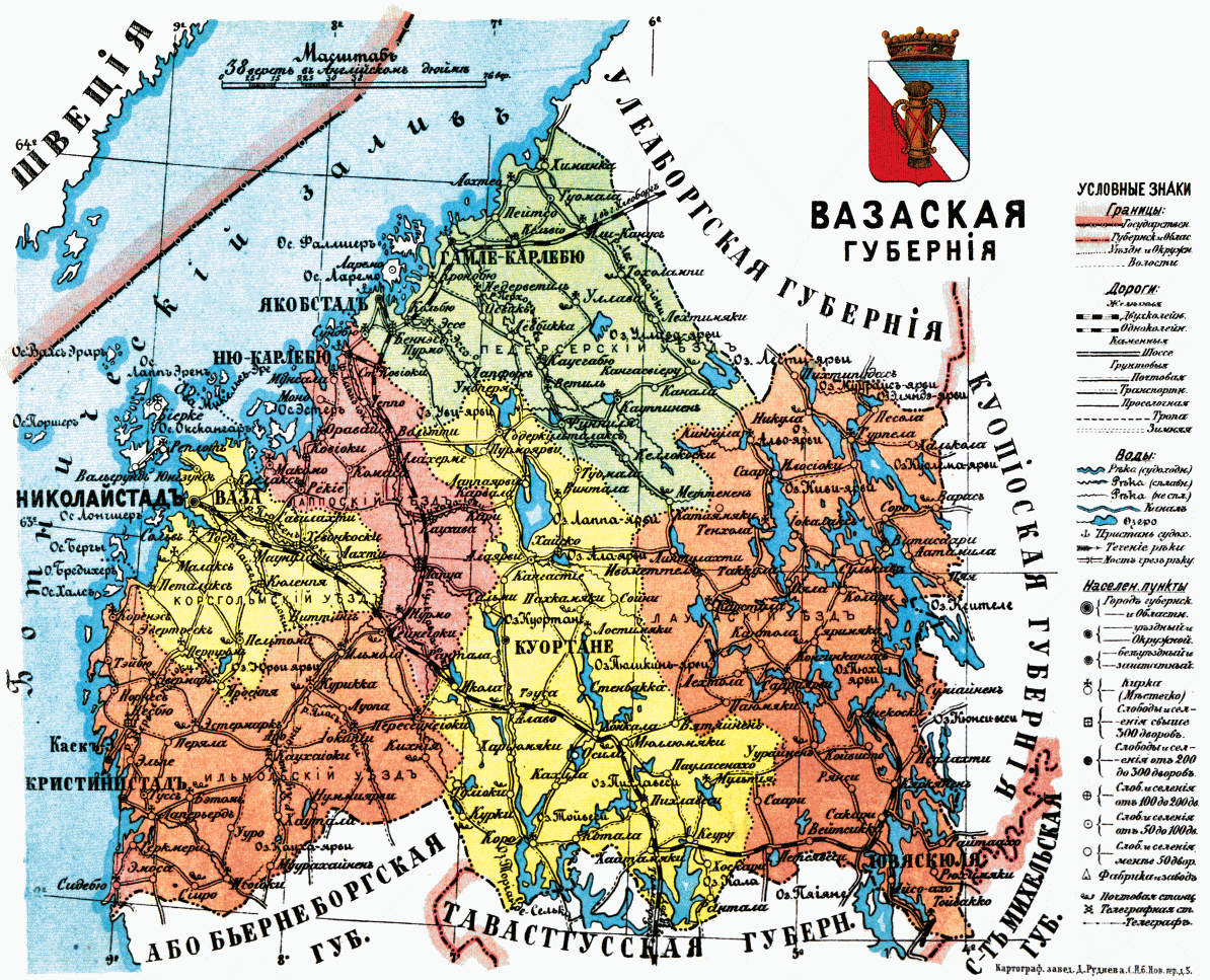 Карта Вазаской губернии Великого княжества Финляндского, 1913